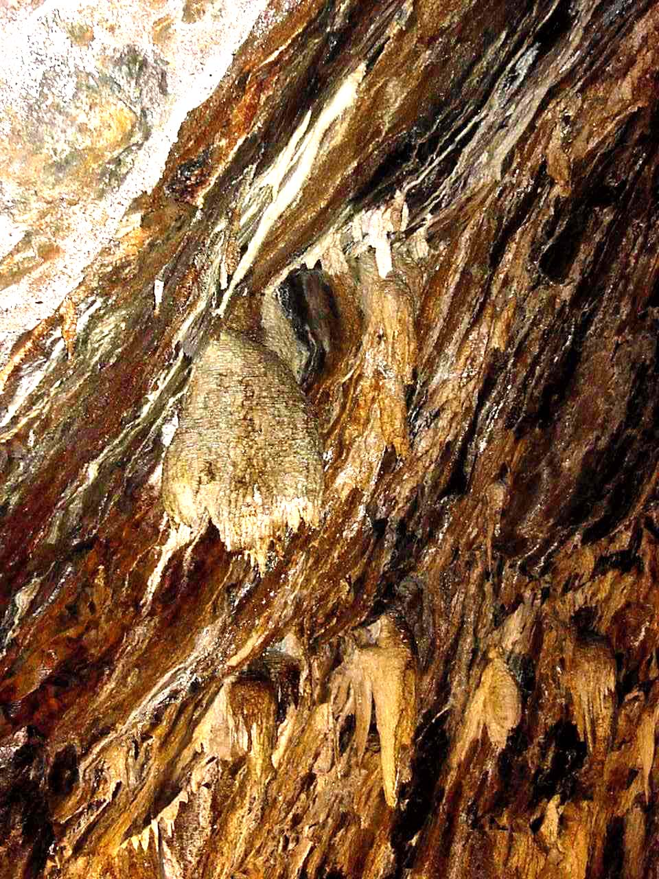 Formações de calcário no Algar do Carvão, Ilha Terceira, Açores - Portugal.